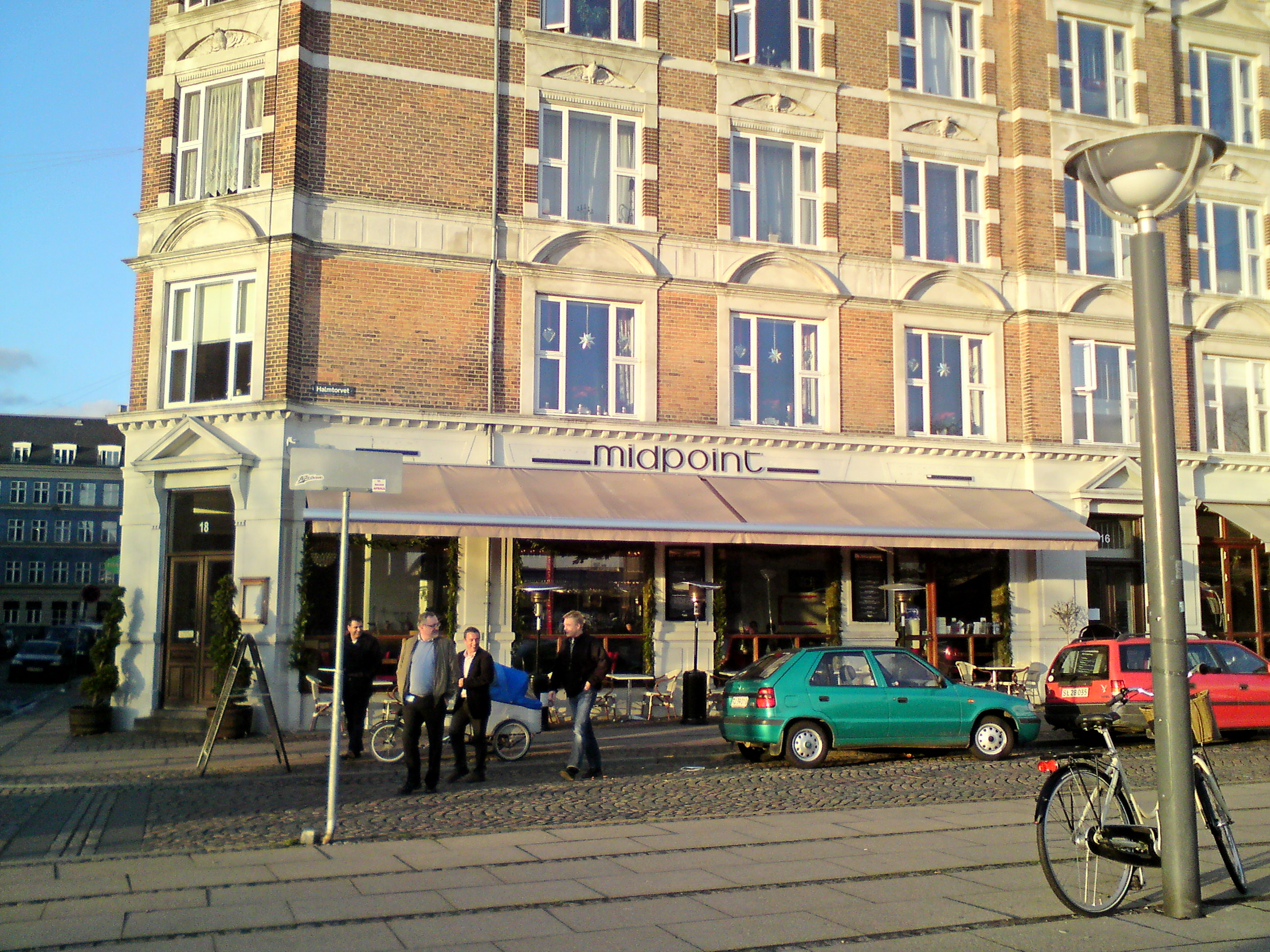 Butik i Vesterbro, Köpenhamn